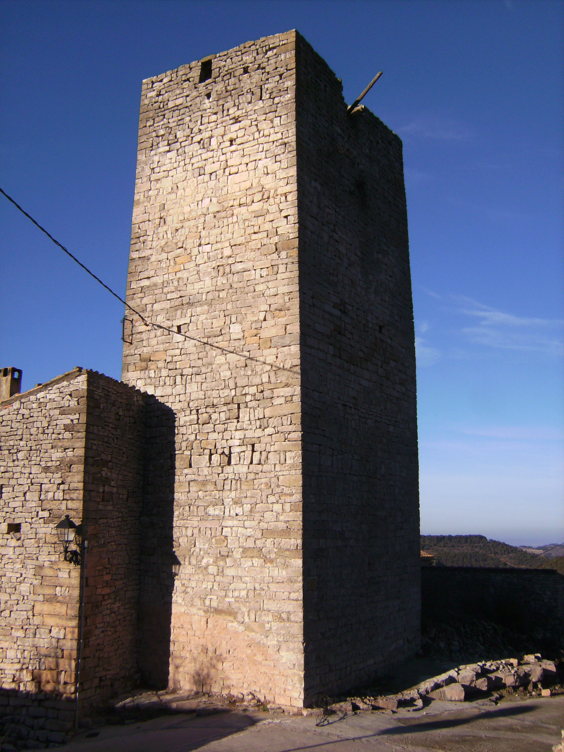 Glorieta - Torre (Vista 1)